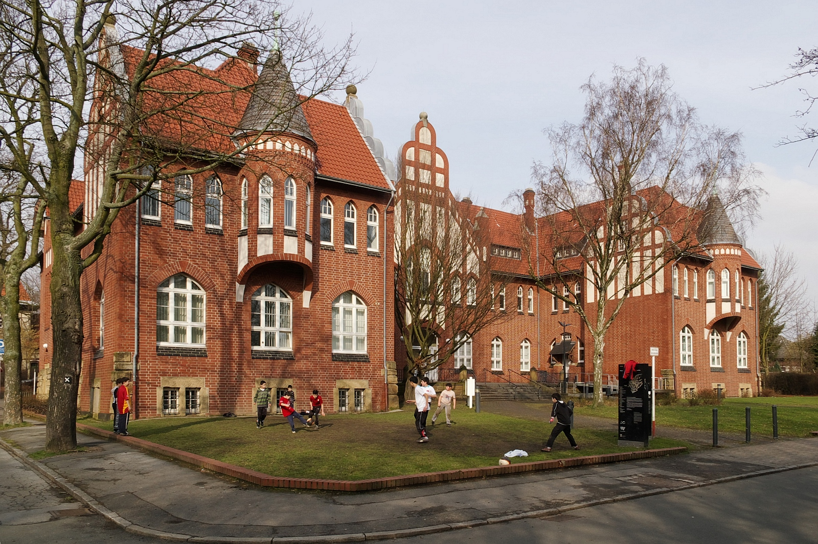 Alte Kolonie Eving, Dortmund, Nordrhein-Westfalen